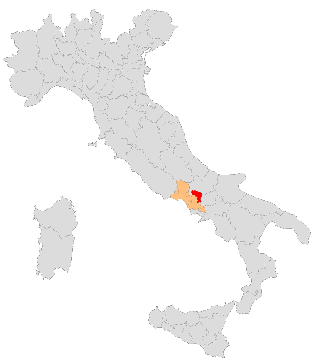 Il circondario di Piedimonte d'Alife nella provincia di Terra di Lavoro (1860-1927)